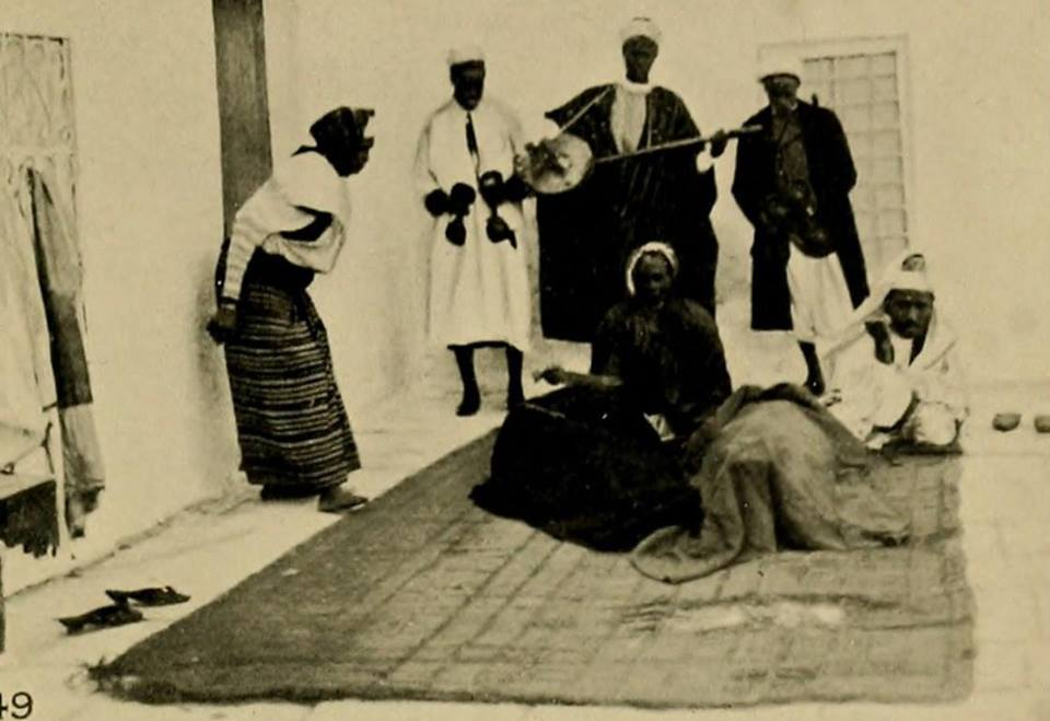 Tunisie تونس